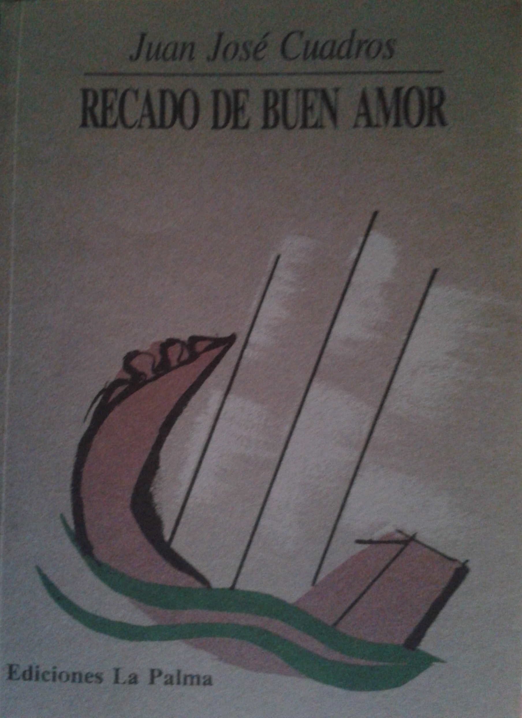 Recado de buen amor de Juan José Cuadros. Reedición